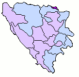 BosniaCanton Posavina